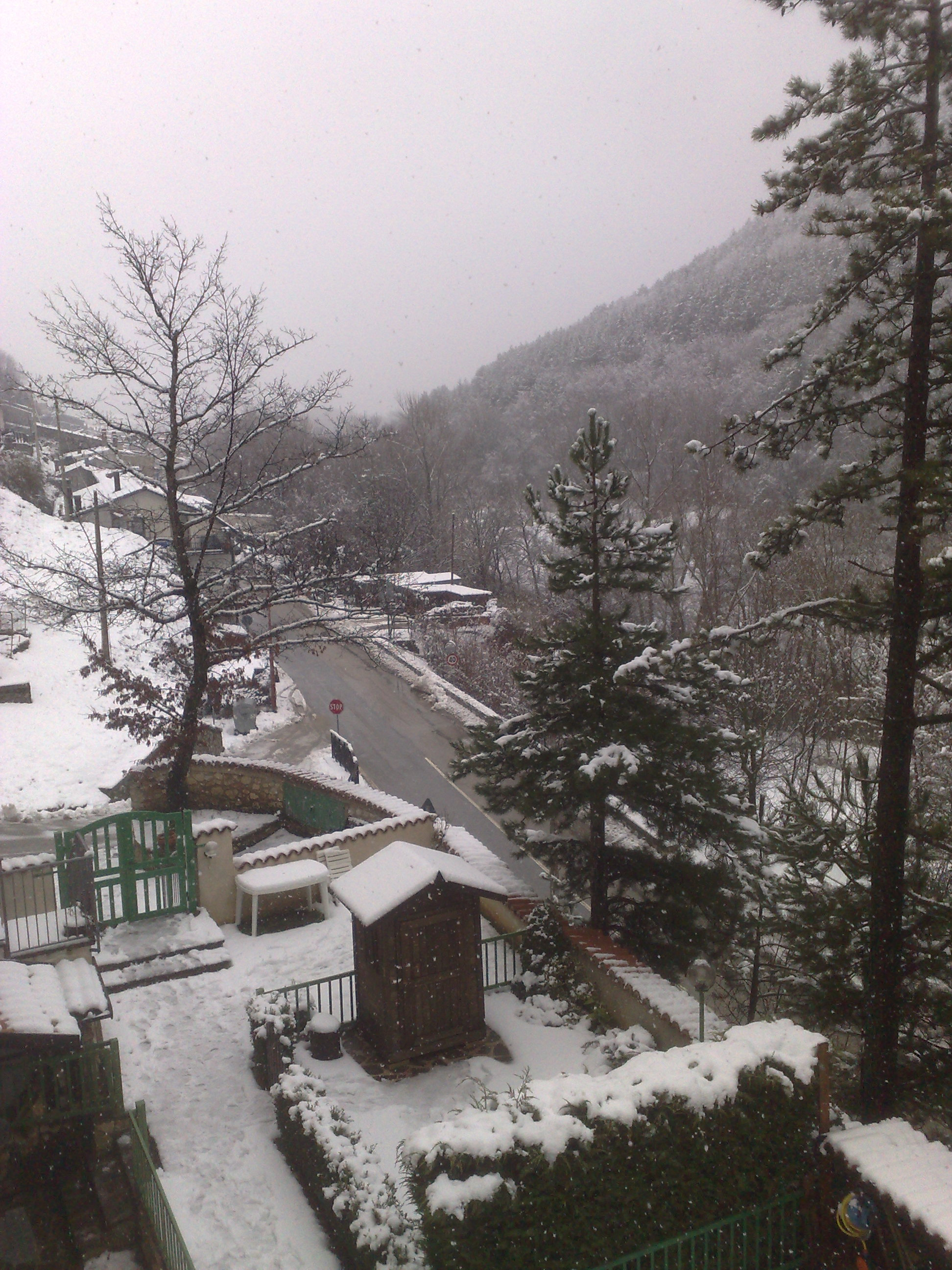 Nevicata a Villetta Barrea